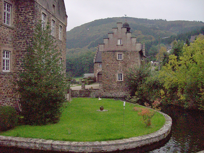 Schloss Lenhausen der Familie von Plettenberg, Finnentrop (Germany). Adelssitz in der Ortschaft Lenhausen, nahe der Mündung des Fretterbachs in die Lenne; im 14. Jahrhundert als Wasserburg errichtet und im 17. Jahrhundert zum Schloss umgebaut.